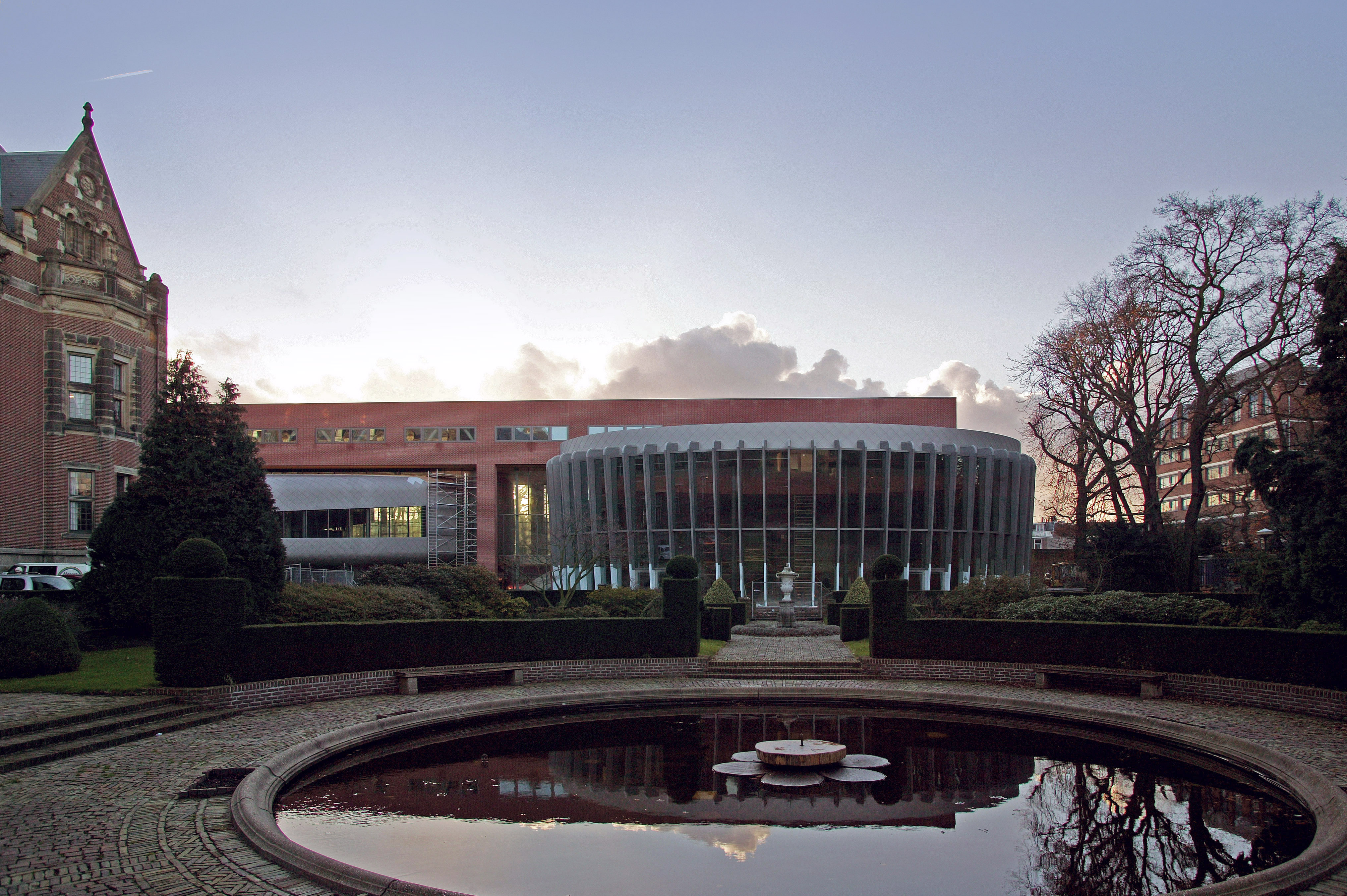 Tuin achter het Vredespaleis ontworpen door Elias Canneman en Elisabeth Canneman-Philipse in 1977